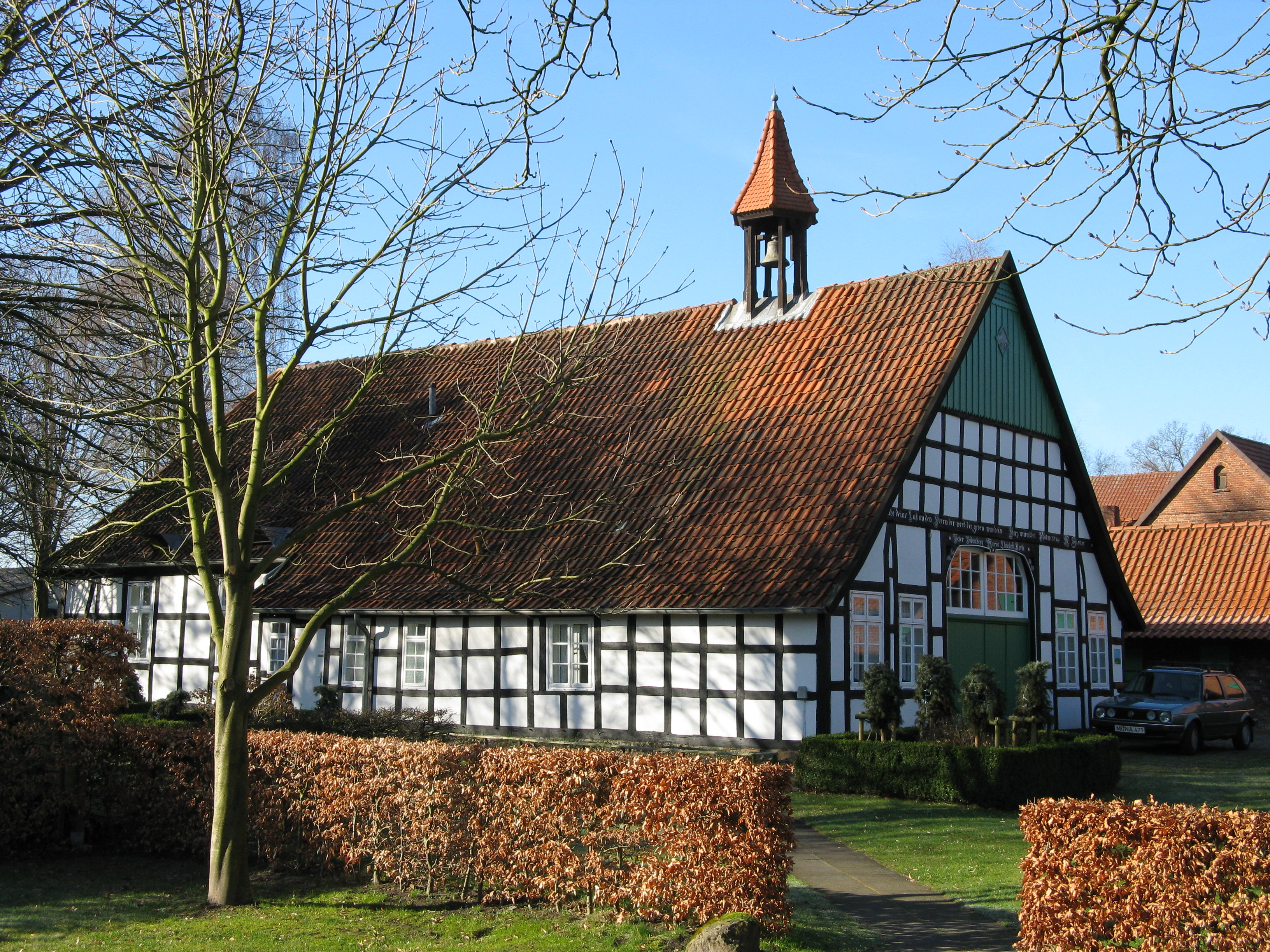 Das Heimathaus in Minden-Kutenhasuen, Nordrhein-Westfalen.